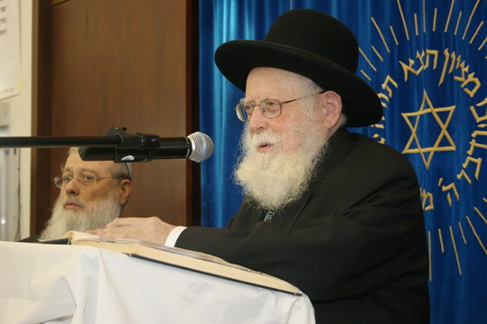 ישיבת מרכז הרב. אברהם אלקנה כהנא שפירא